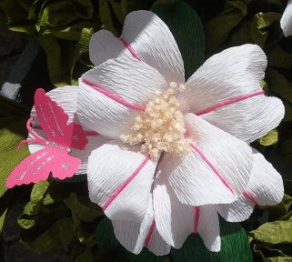 Flor feita de papel que ornamentou uma das ruas de Campo Maior